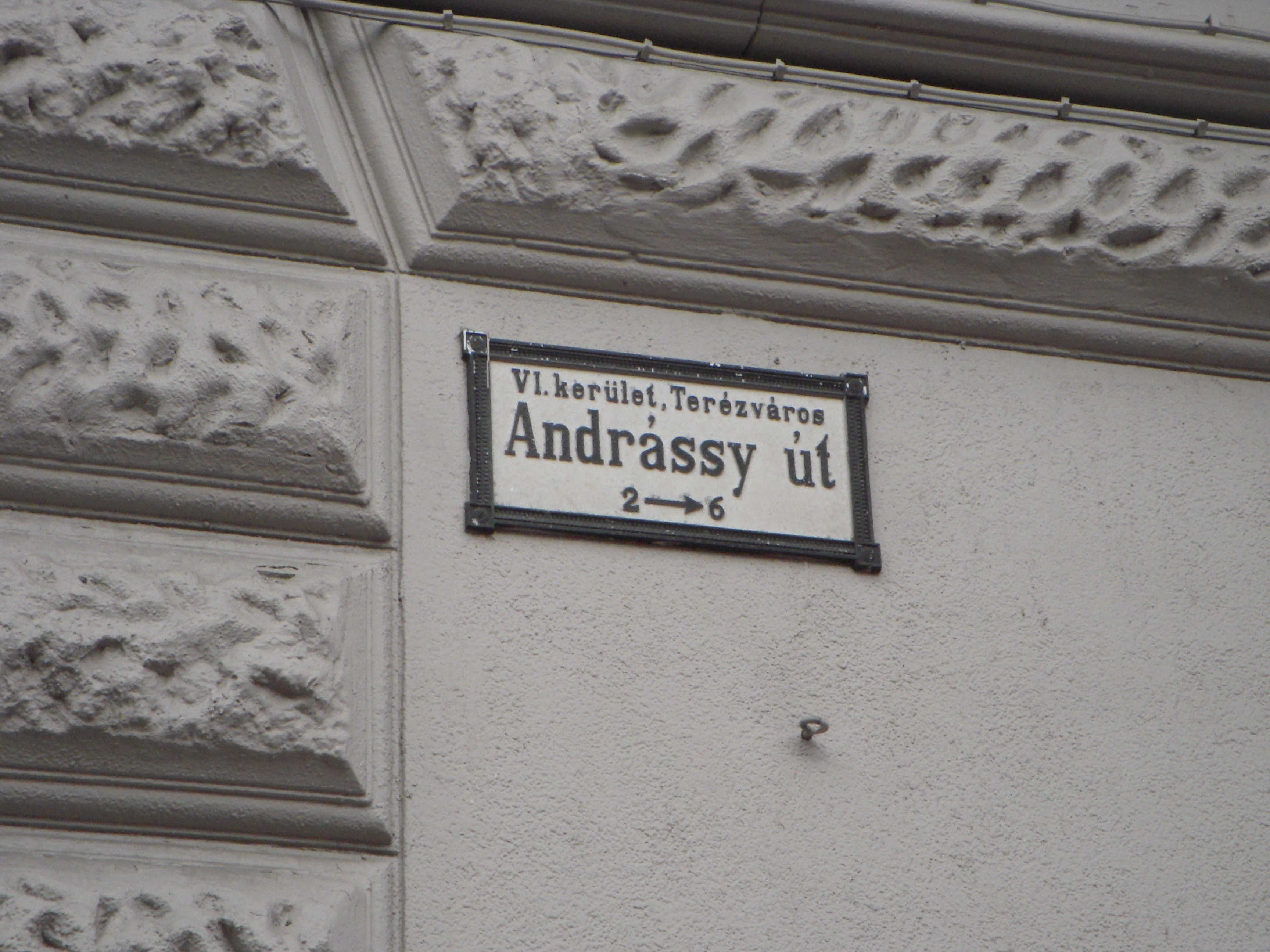 Gadeskilt fra Andrássy út, september 2009.